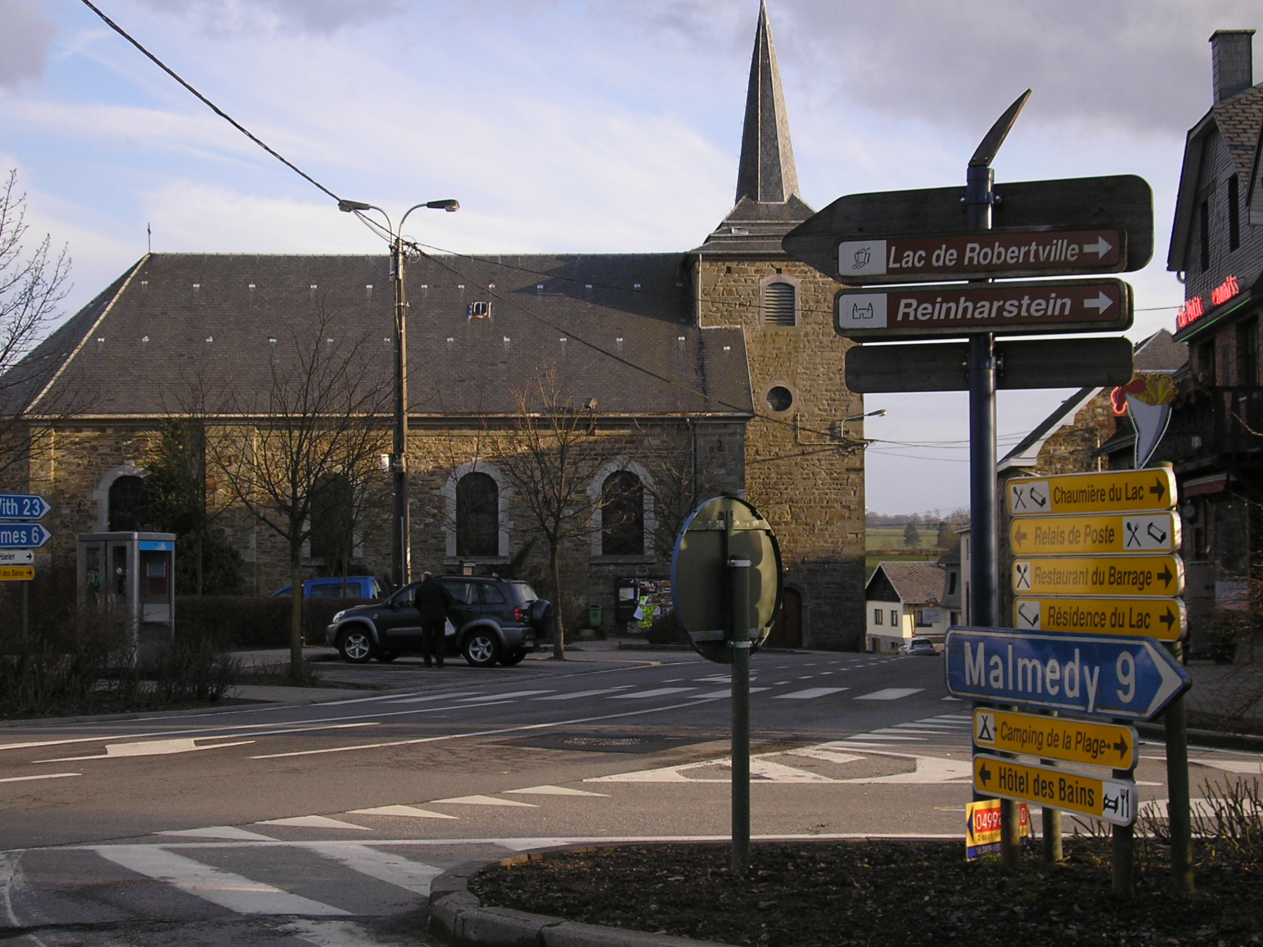 Weismes-Robertville, Church St. Joseph, East Belgium